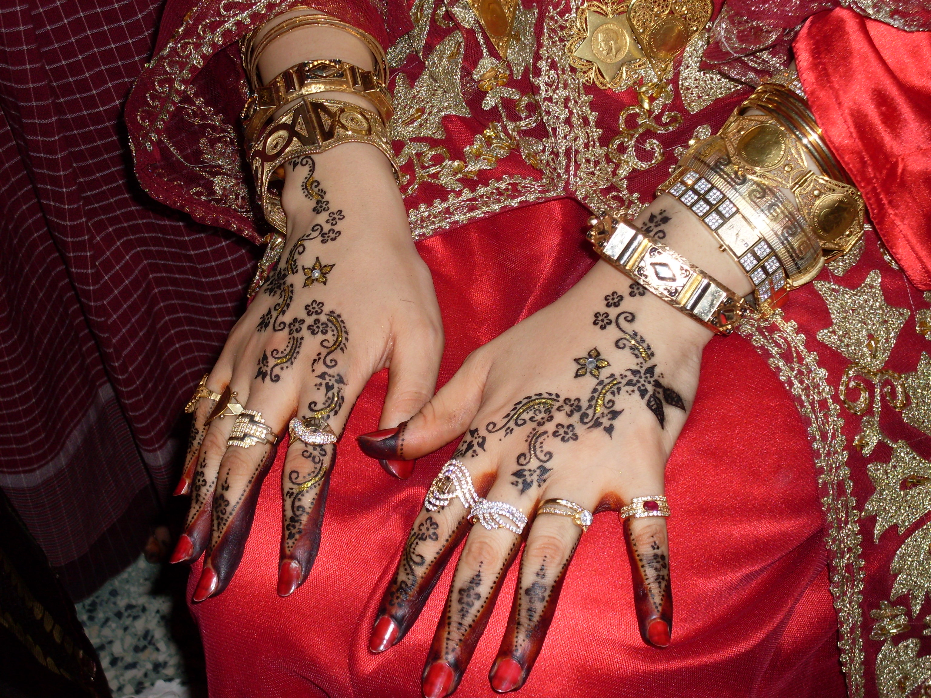 Djerba mains d'une mariée avec Henné et Harkous